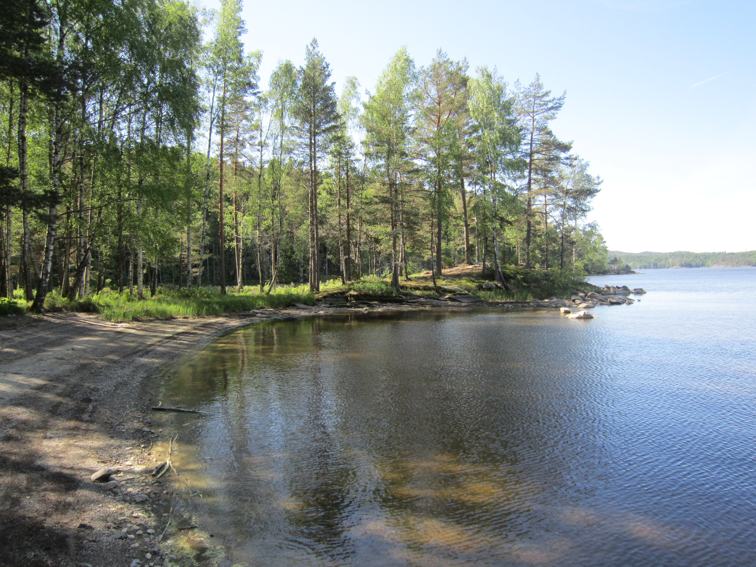 Tripperødbukta ved Aspern